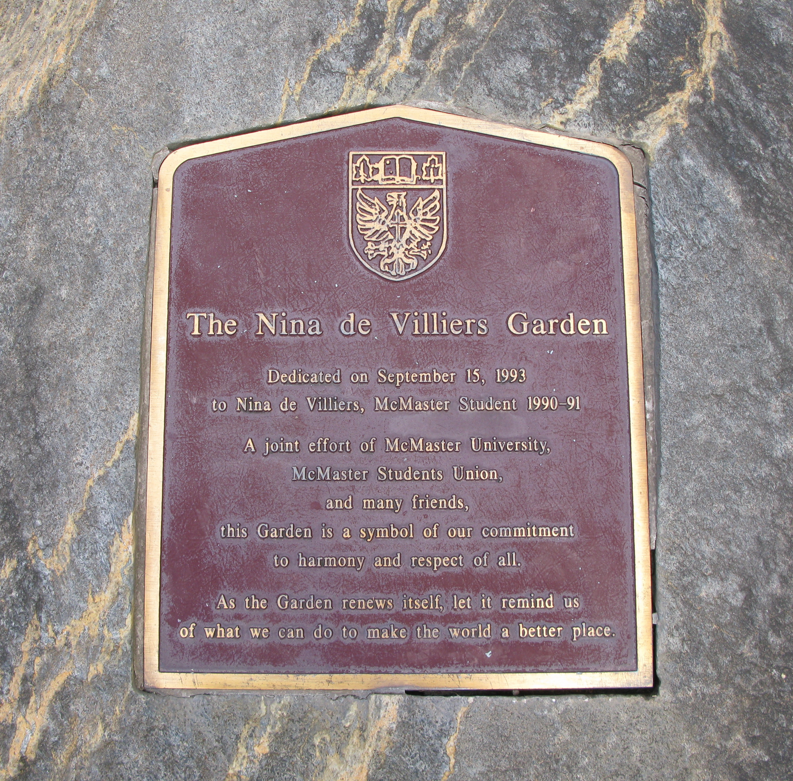 Memorial plaque in Nina de Villers Garden at McMaster University